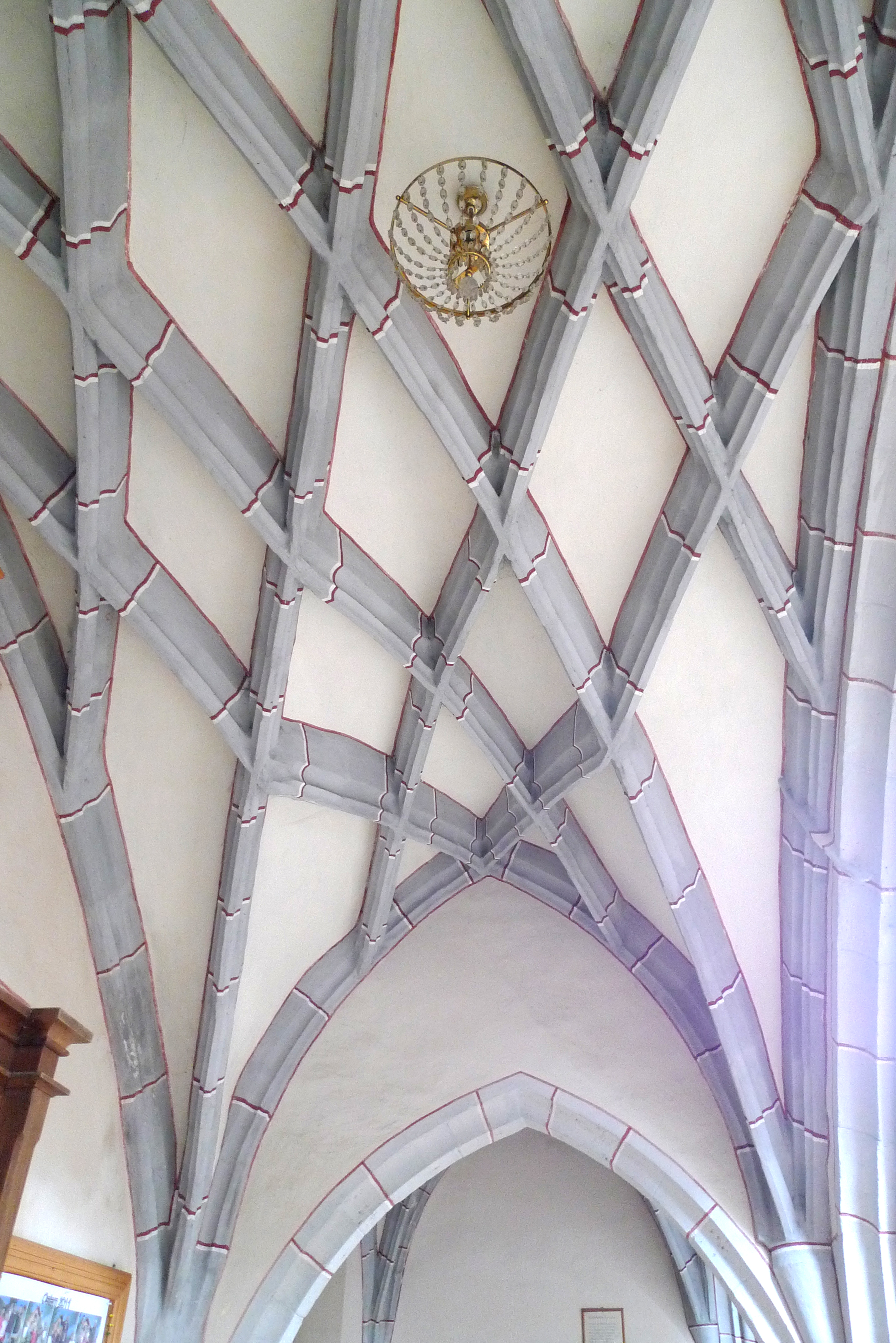 Kath. Pfarrkirche, Wallfahrtskirche Mariä Himmelfahrt und Friedhof